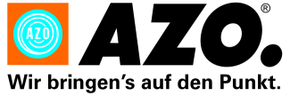 Logo der AZO GmbH + Co. KG